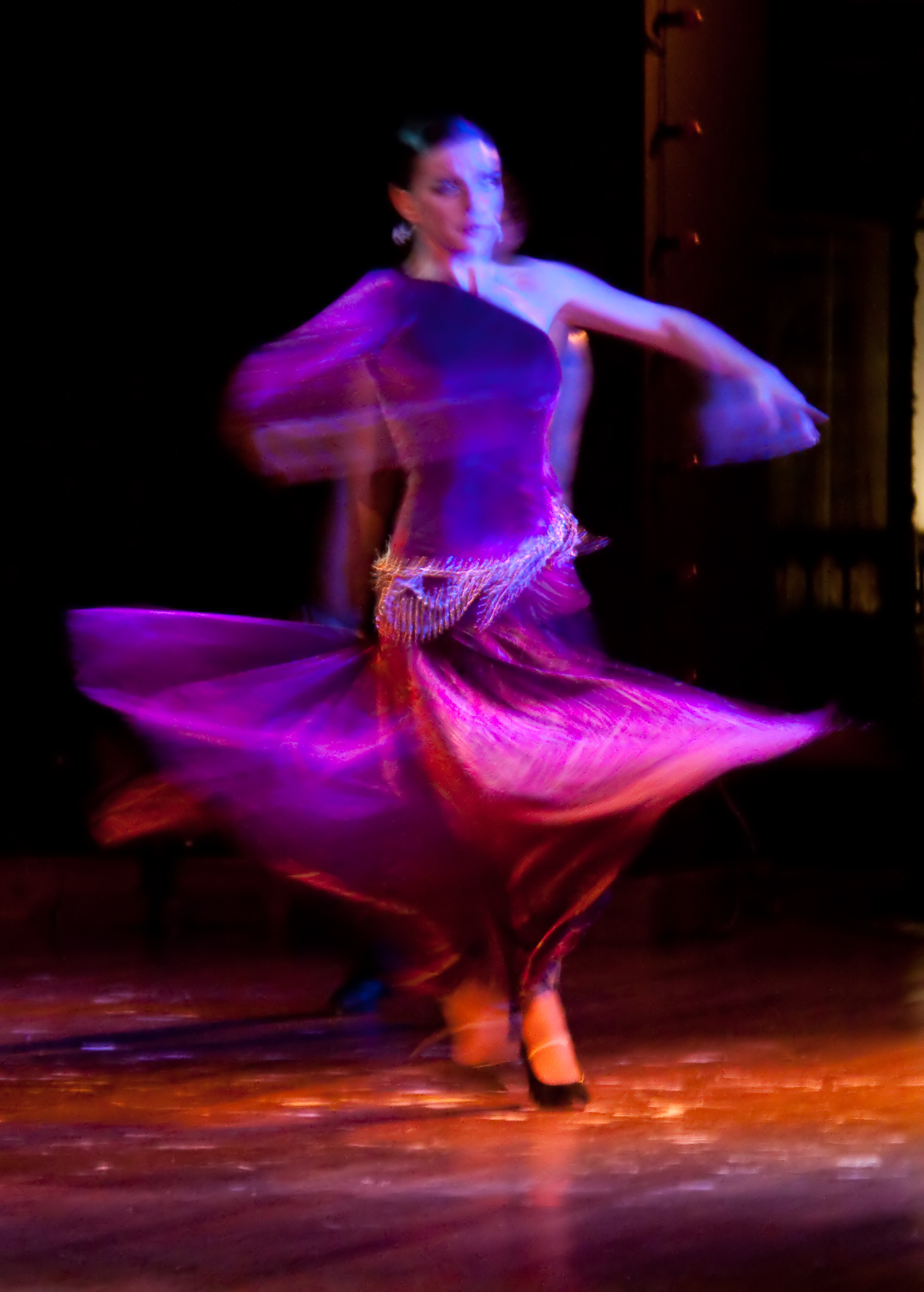 Flamenco Dancer 2